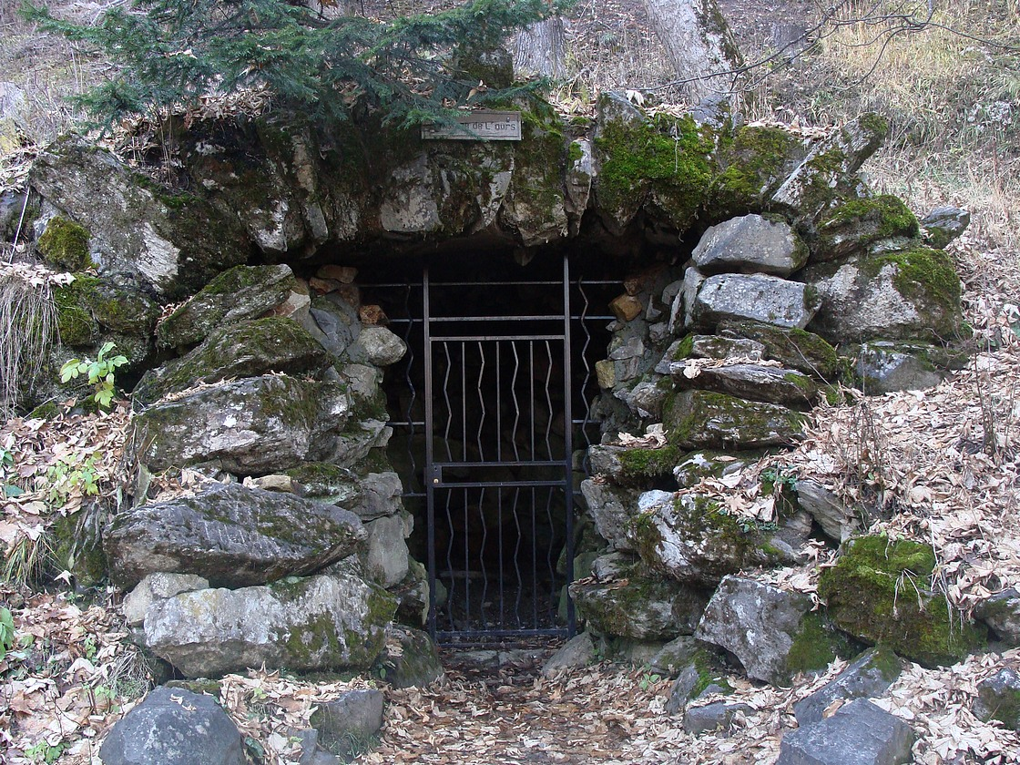 Grotte dite "Fontaine de l'ours" dans la forêt de Boscodon (Hautes-Alpes).